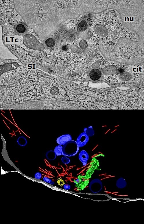 Linfocito T citotóxico, Sinapsis Inmunológica. Arriba imagen de MET de la interfase del LTc con su célula objetivo. Tomograma de la sinapsis inmunológica entre un Linfocito T citotóxico (LTc) y una célula objetivo (abajo). El Centro organizador del microtúbulo (MTOC) está polarizado al sitio de contacto célula-célula. Los gránulos líticos electron-densos son transportados a lo largo de los microtúbulos hacia la hendidura sináptica. Aquí ella se fusiona con la membrana y excreta las proteínas citotóxicas que disparan la muerte de la célula objetivo. Abajo reconstrucción de los elementos constituyentes de la sinapsis.